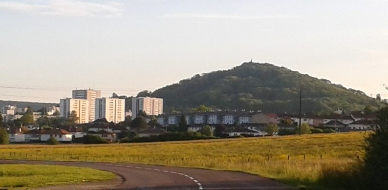 La colline de la Motte et le quartier du Montmarin